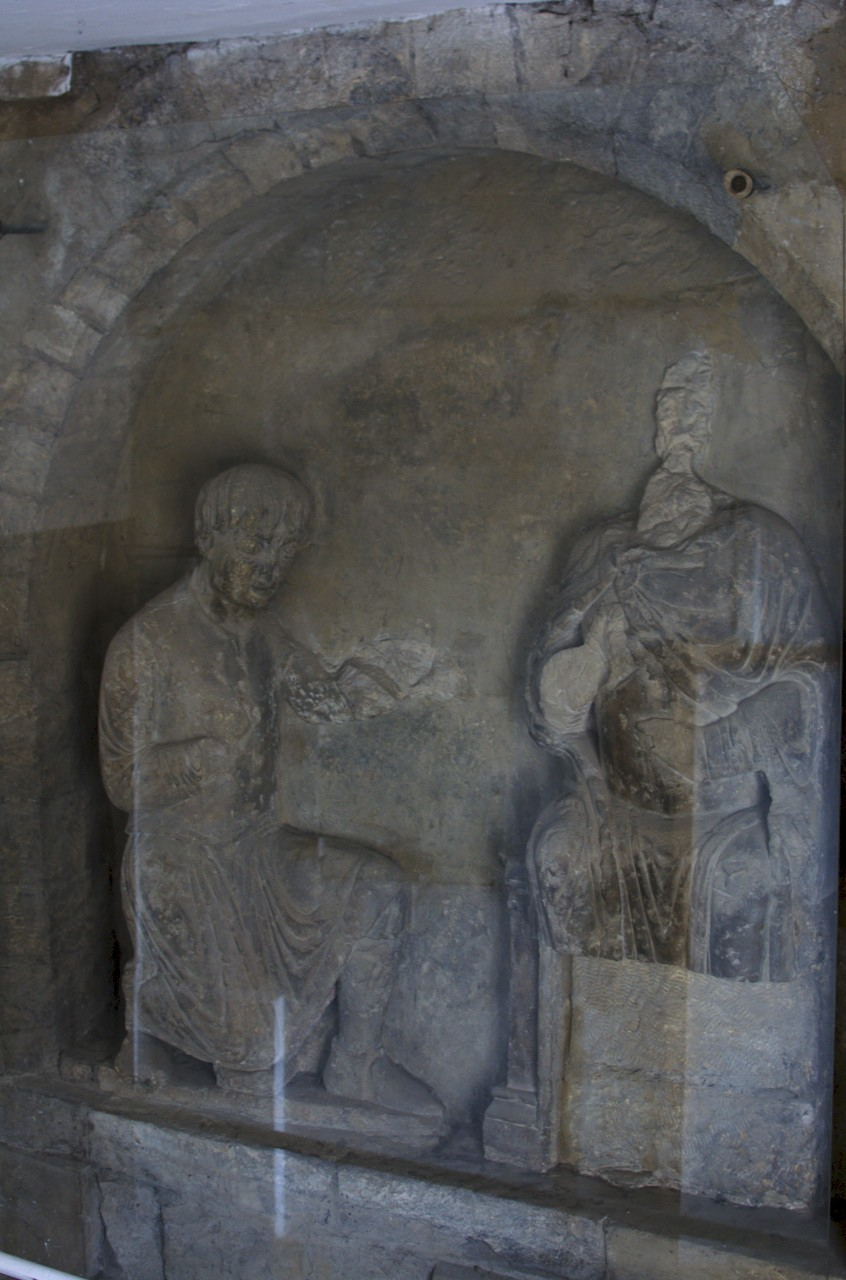 Basreliéf na východní straně Juditiny věže je vrcholným dílem českého románského sochařství